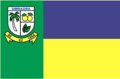 bandeira Municipal de Umbaúba